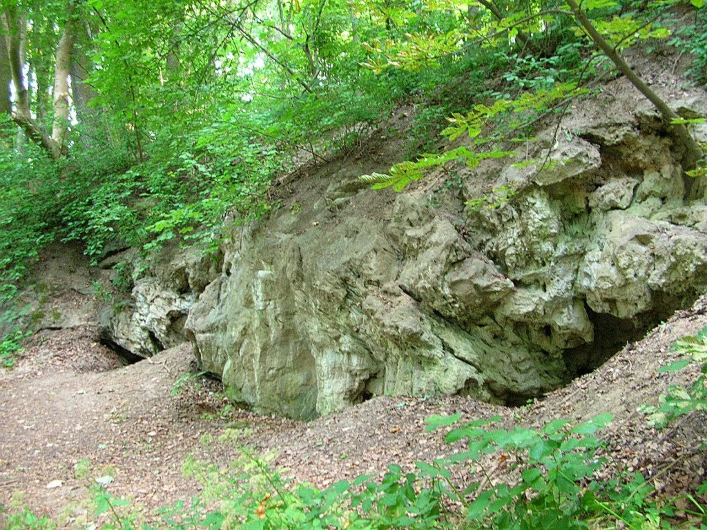 Jaskinia Bajka - pomnik przyrody, w pobliżu Gądecza, gmina Dobrcz, we wschodnim zboczu Doliny Dolnej Wisły